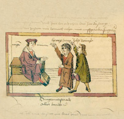 Die zwei Bürgermeister der Stadt Volkach legen vor ihrem Amtsvorgänger den Bürgermeistereid ab. Miniatur aus dem Volkacher Salbuch.